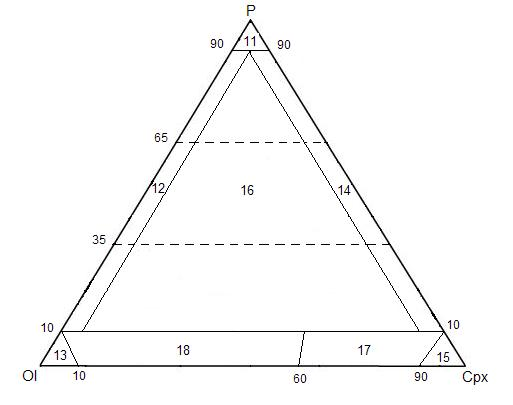 Trójkąt B - gabra